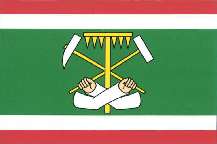 Krásno, okres Sokolov, vlajka města